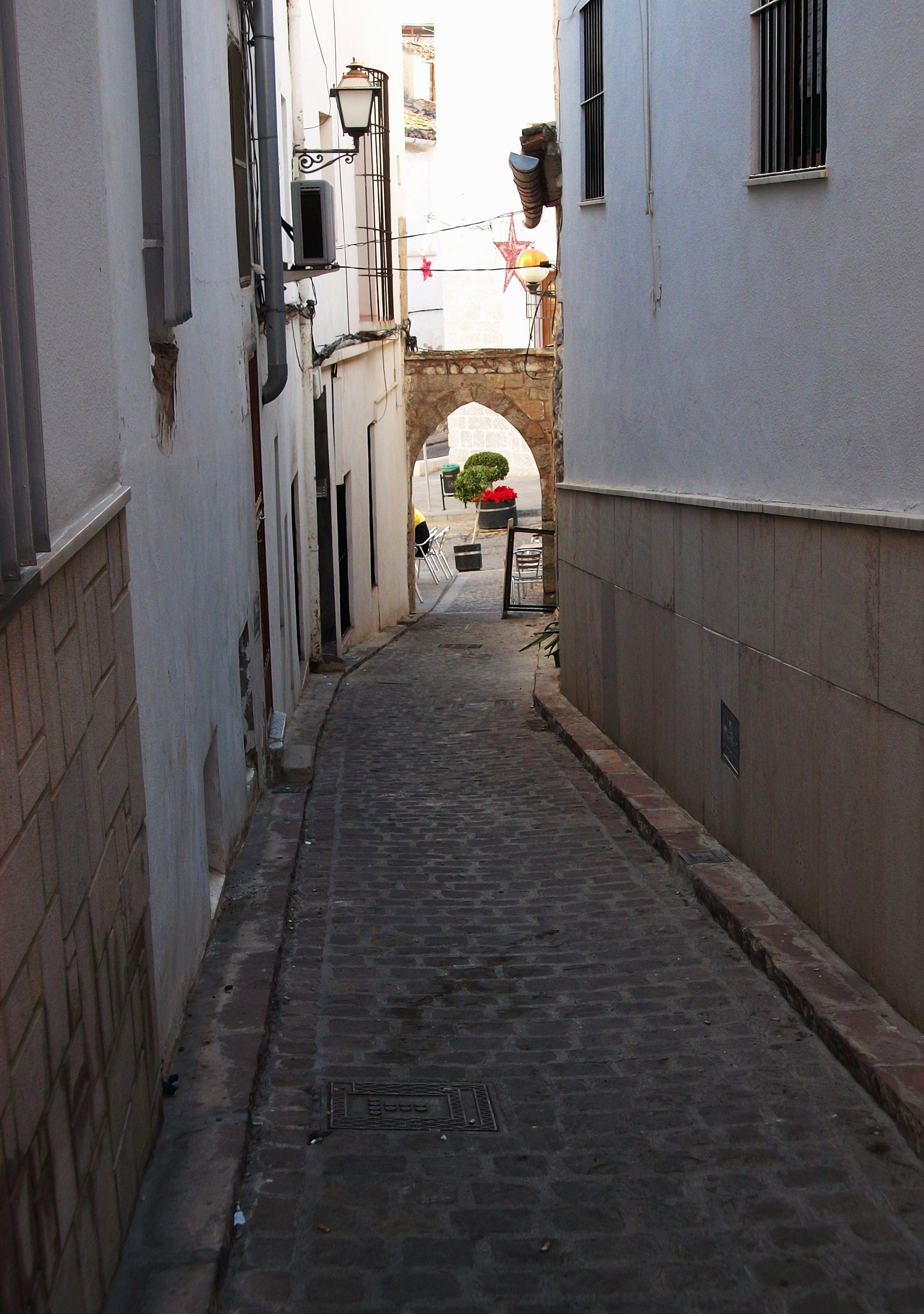 Carrer del Call o jueria de Sagunt.